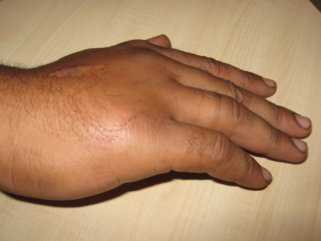 Oedeme sur fracture de la tête du 5e métatarse de la main droite